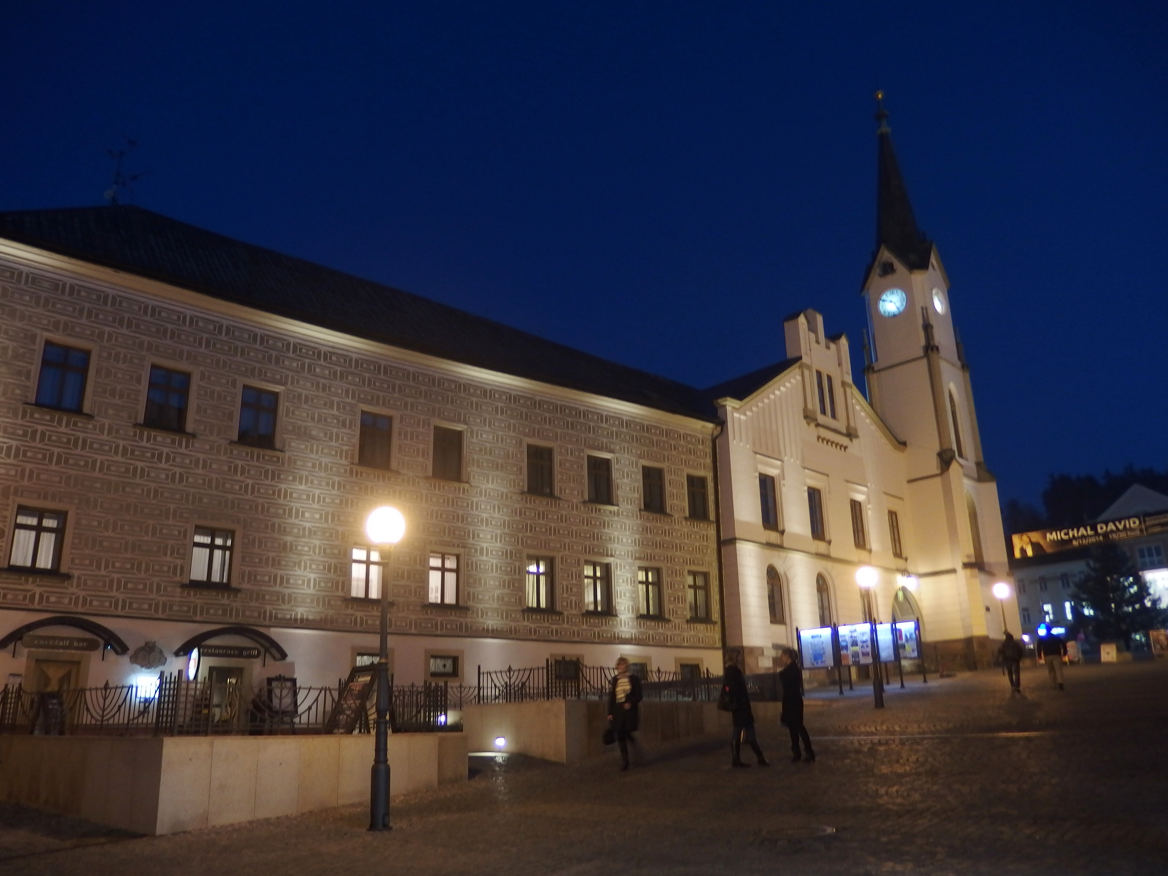 Stará radnice, Krakonošovo náměstí 72/1, Vnitřní Město, Trutnov.